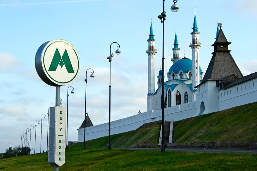 Kremlevskaya metro station entrance (Вход на станцию метро Кремлевская) Kazan Metro (Казанский метрополитен)